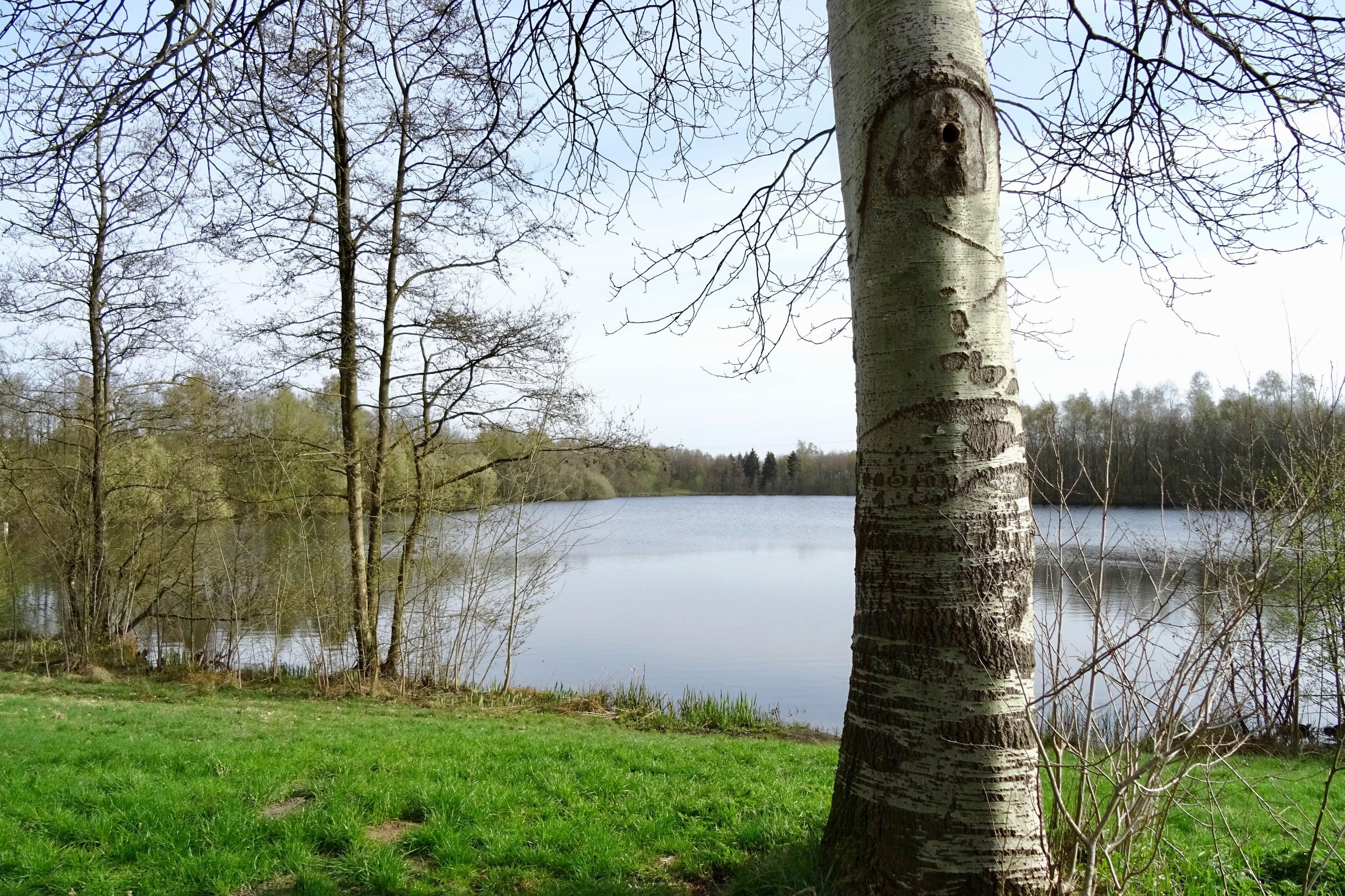 Het natuurgebied Emergo ten noordwesten van Oude Pekela